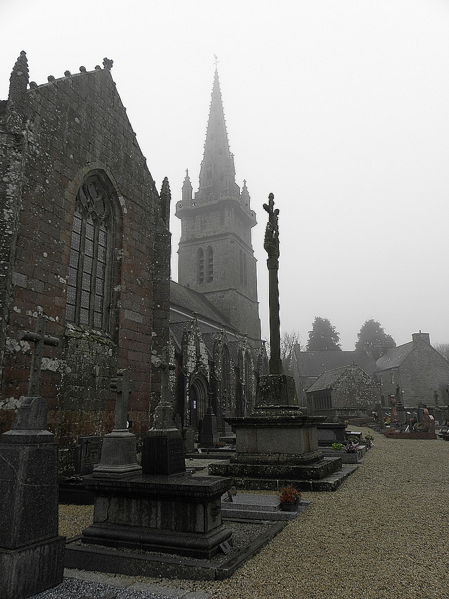 Vue septentrionale de l'église, du calvaire et de l'ossuaire de Lanvellec (22).